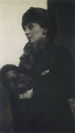 La scrittrice e disegnatrice austro-italiana Rosa Rosà, pseudonimo di Edith von Haynau (1884-1978).